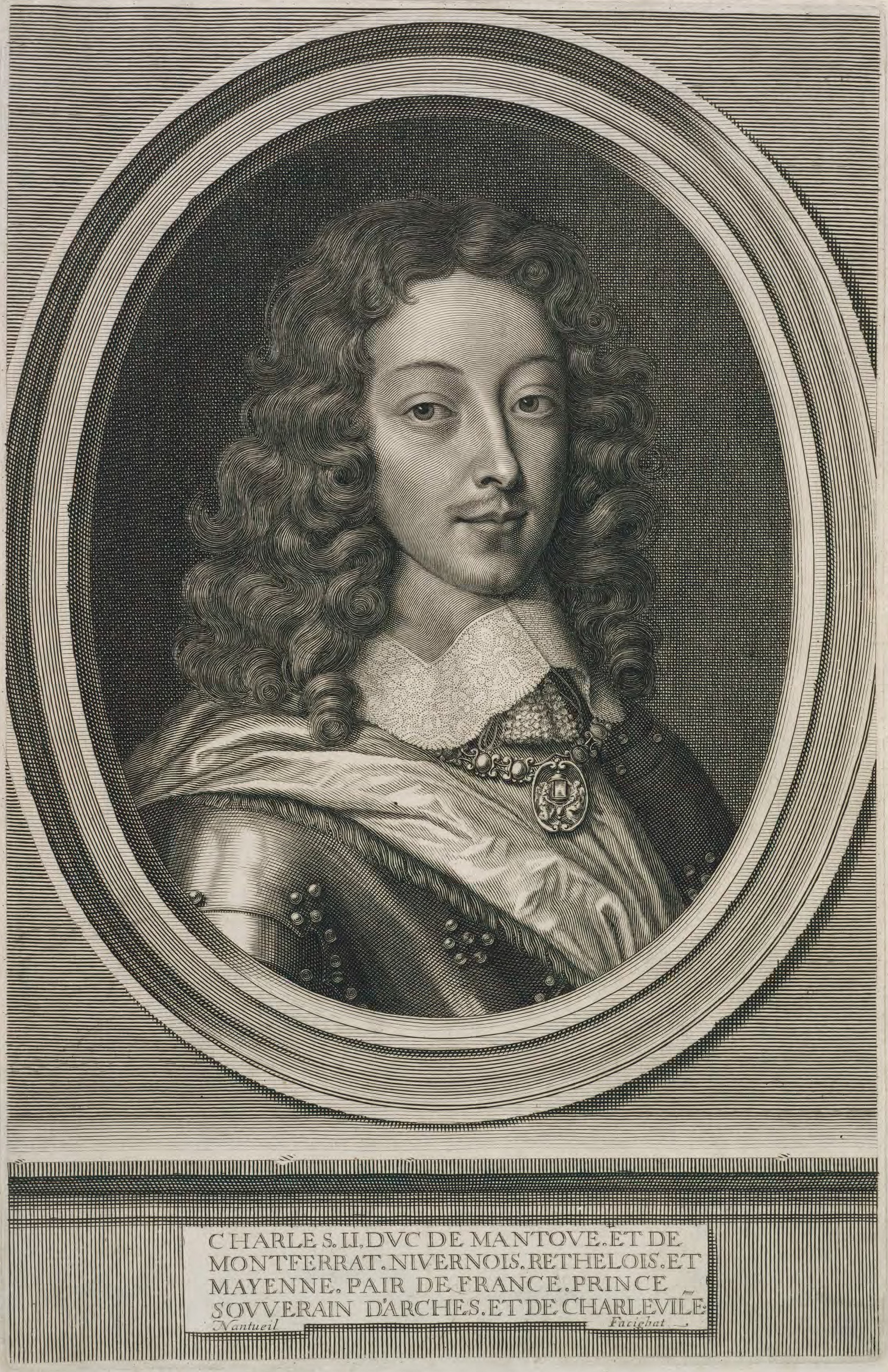 Porträt Carlos II., Herzog von Mantua und Montferrat